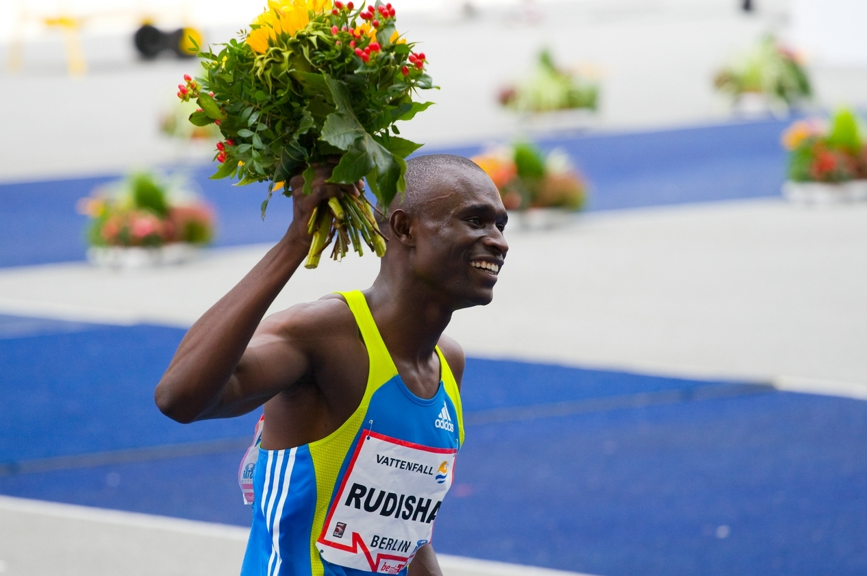 Weltrekord David Lekuta Rudisha 800m